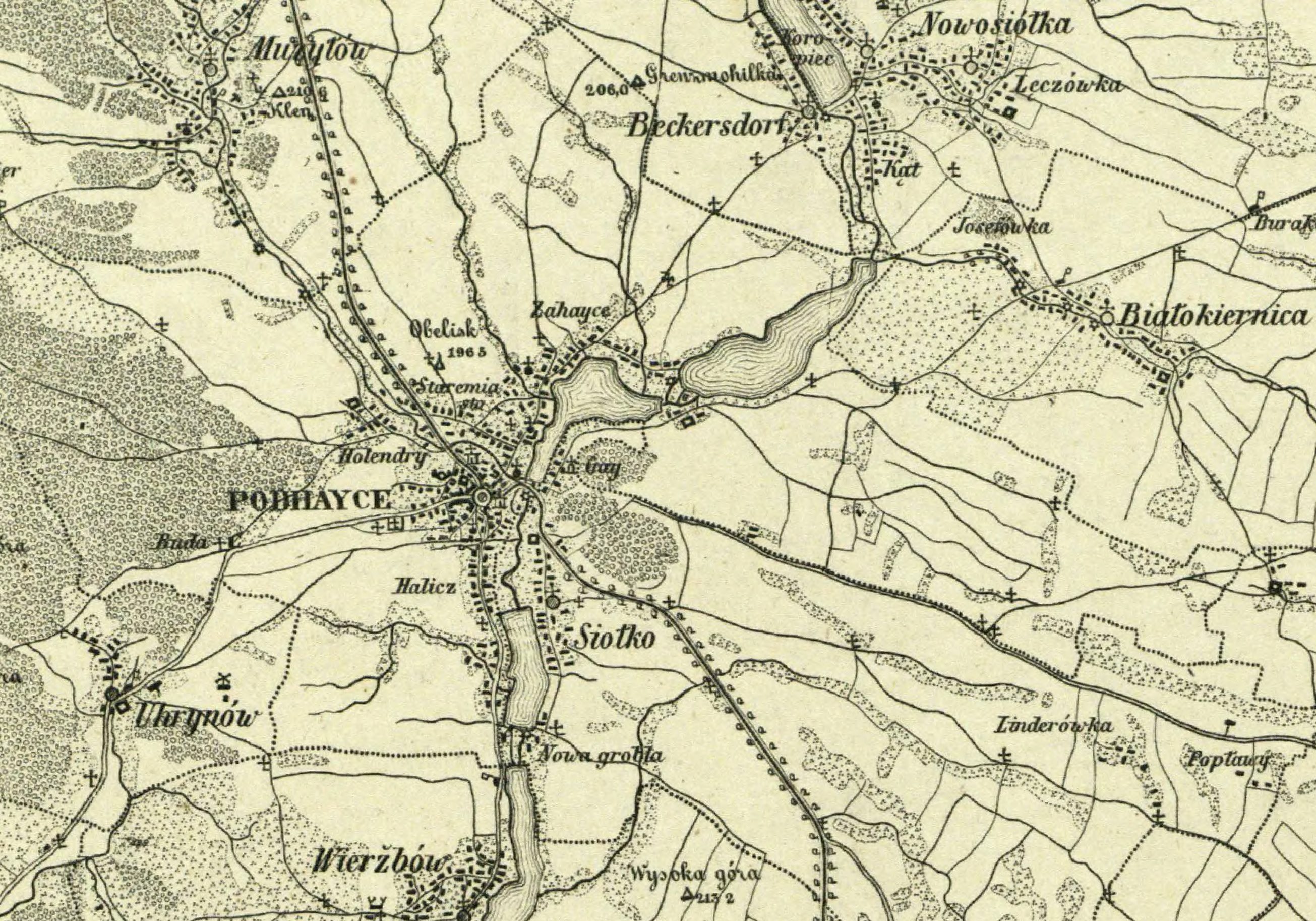 Fragment mapy "Bl. 40. Umgebungen von Podhayce, Złotniki, Manasteržyska und Buczacz" z 1855 uwzględniający Podhajce i najbliższą okolicę